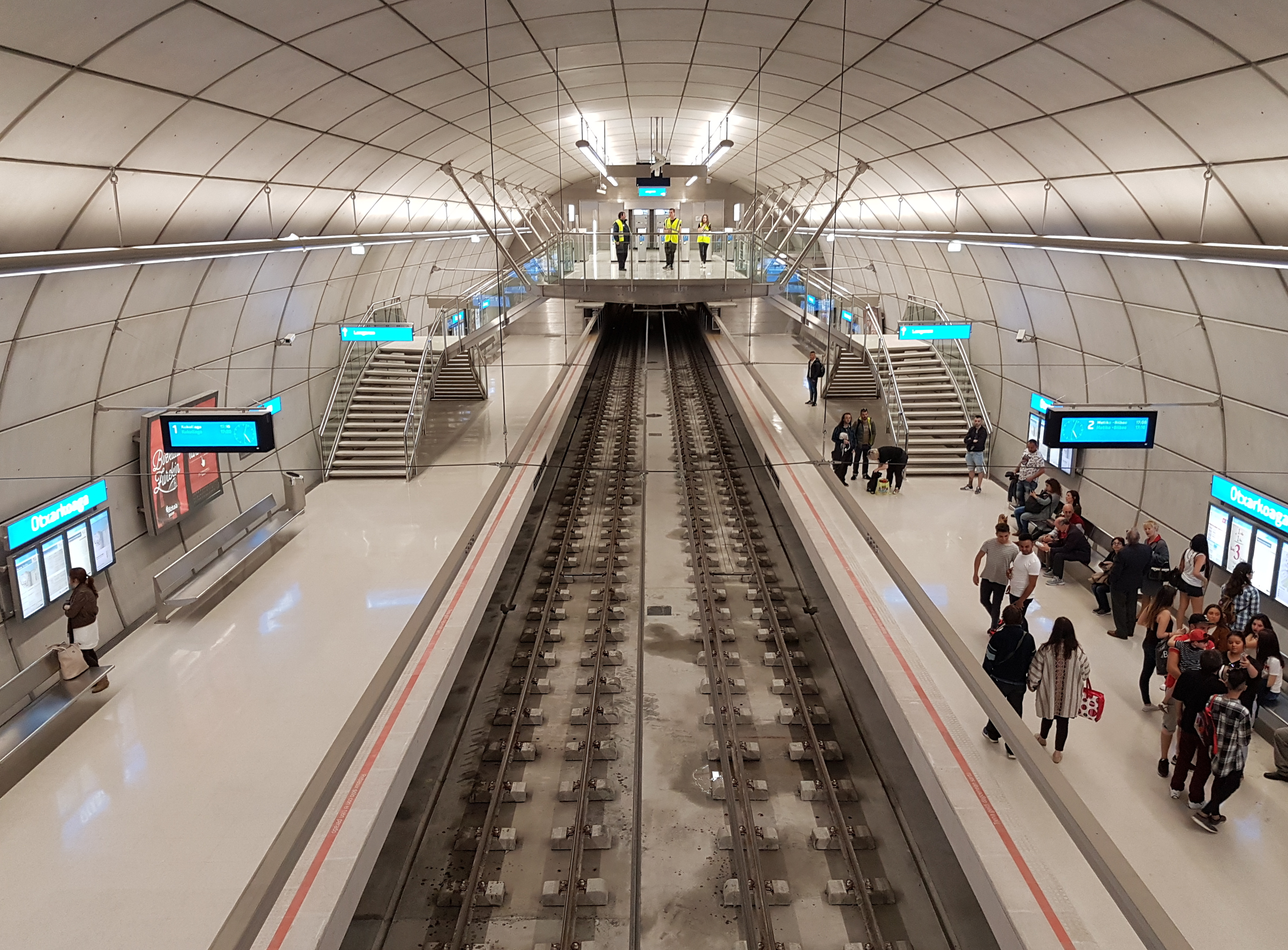 Estación de Otxarkoaga.